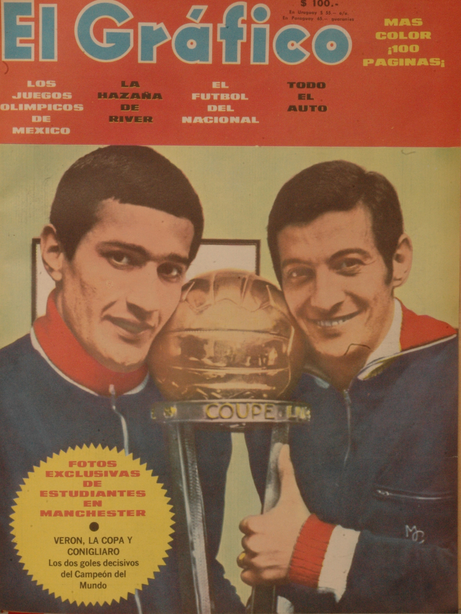 El Grafico del 22 de Octubre de 1968. Edicion 2559